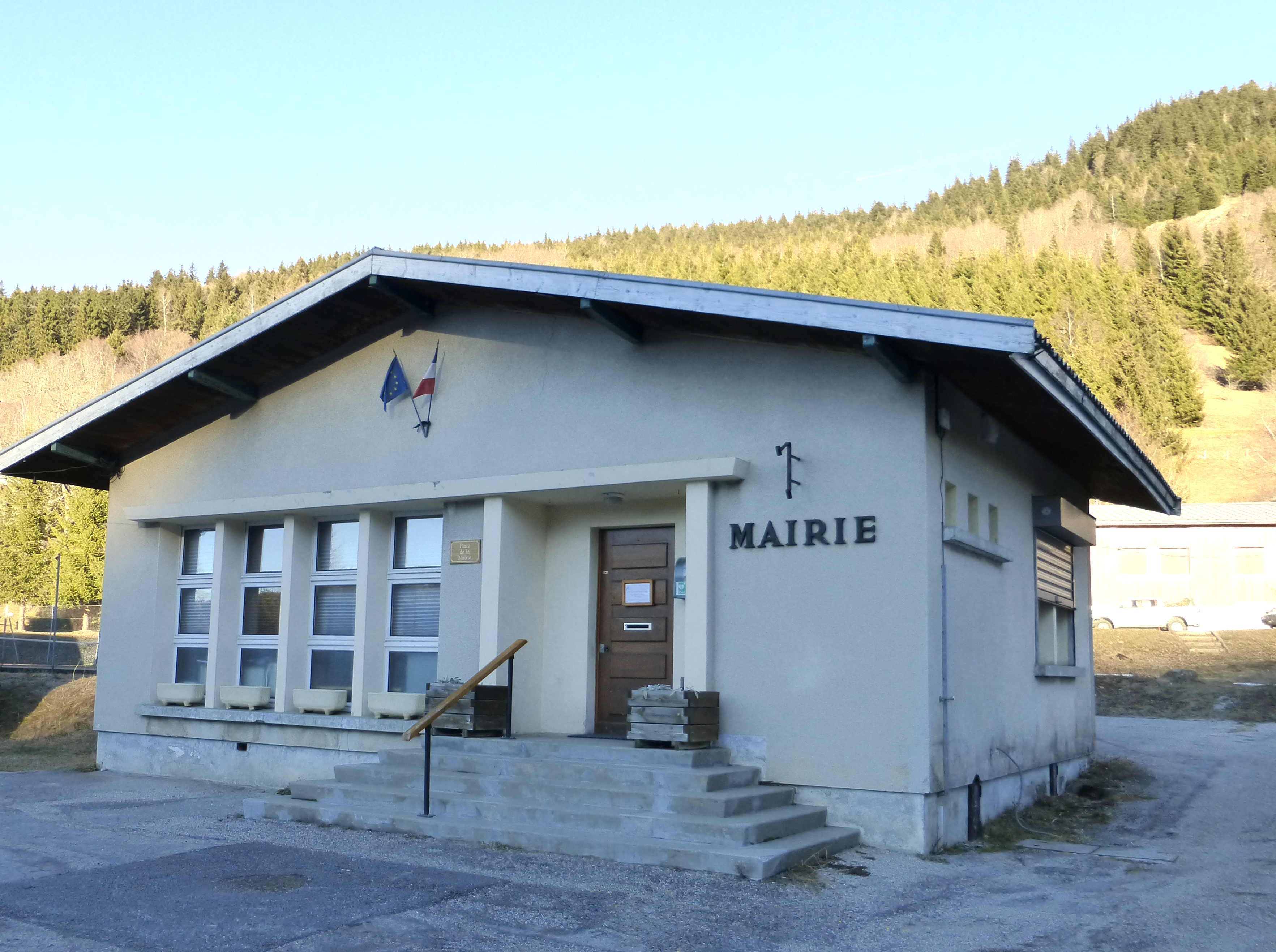 Mairie de La Morte (Isère - France) Décembre 2016